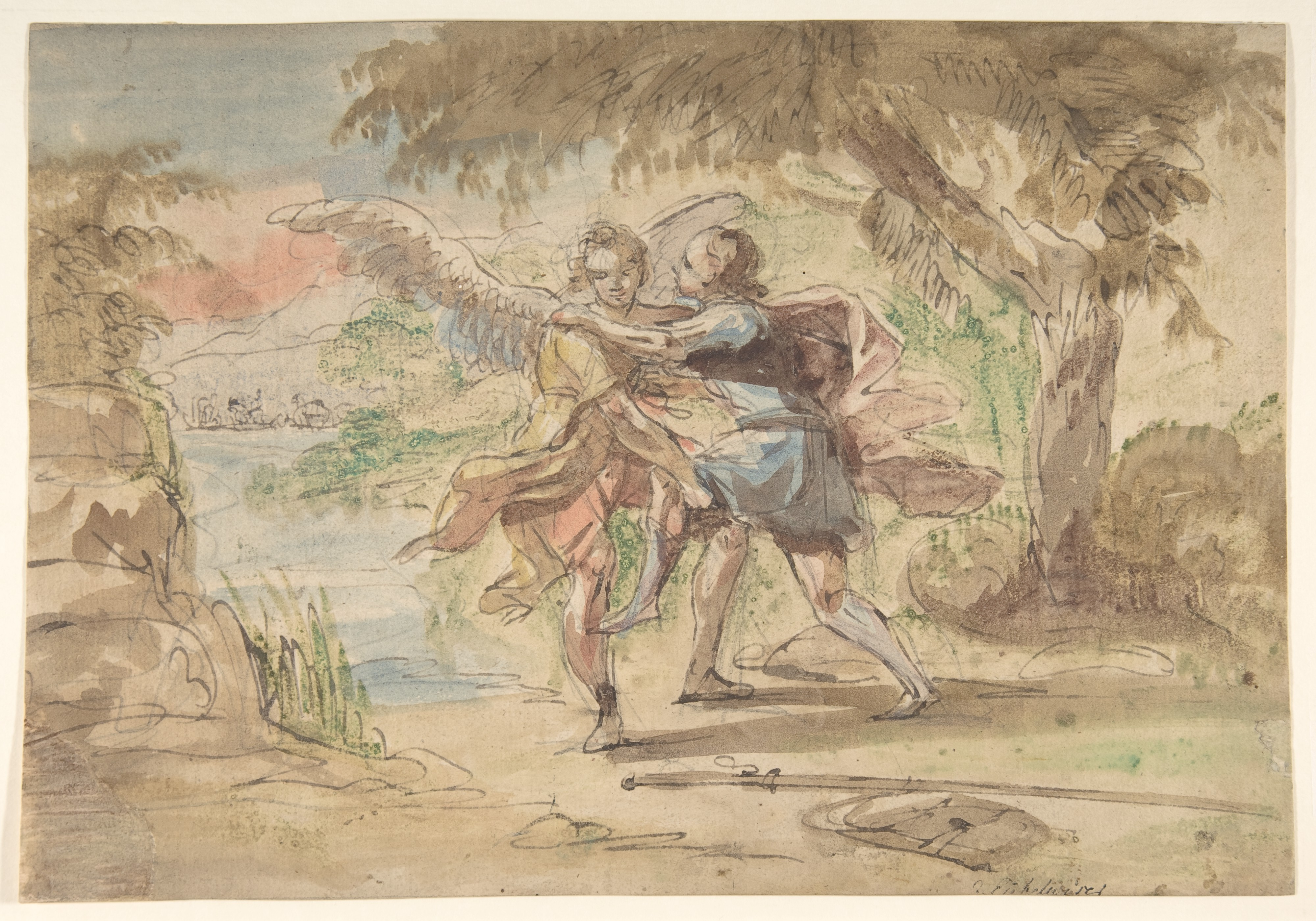 Johann Jacob Eybelwieser, Jakub i Anioł, 20.5 x 29.5 cm, Metropolitan Museum of Art